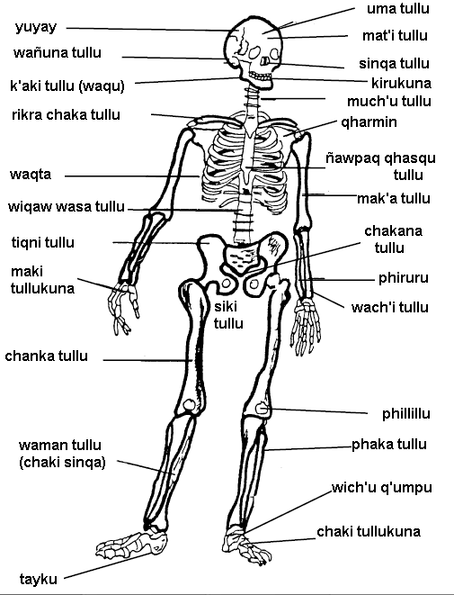 Runa Simi: Runa saqru